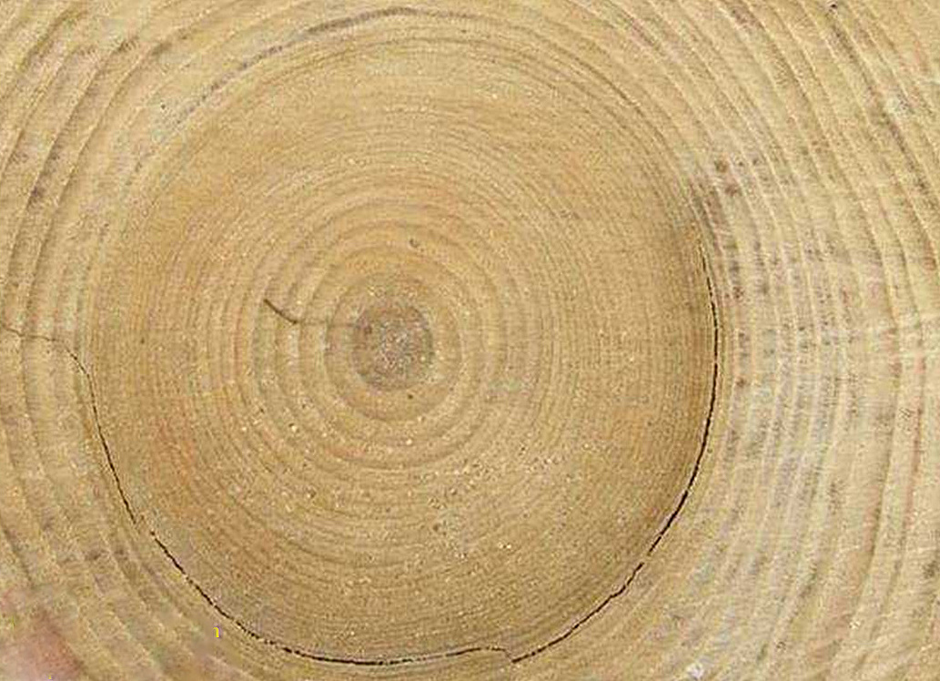 Roulure